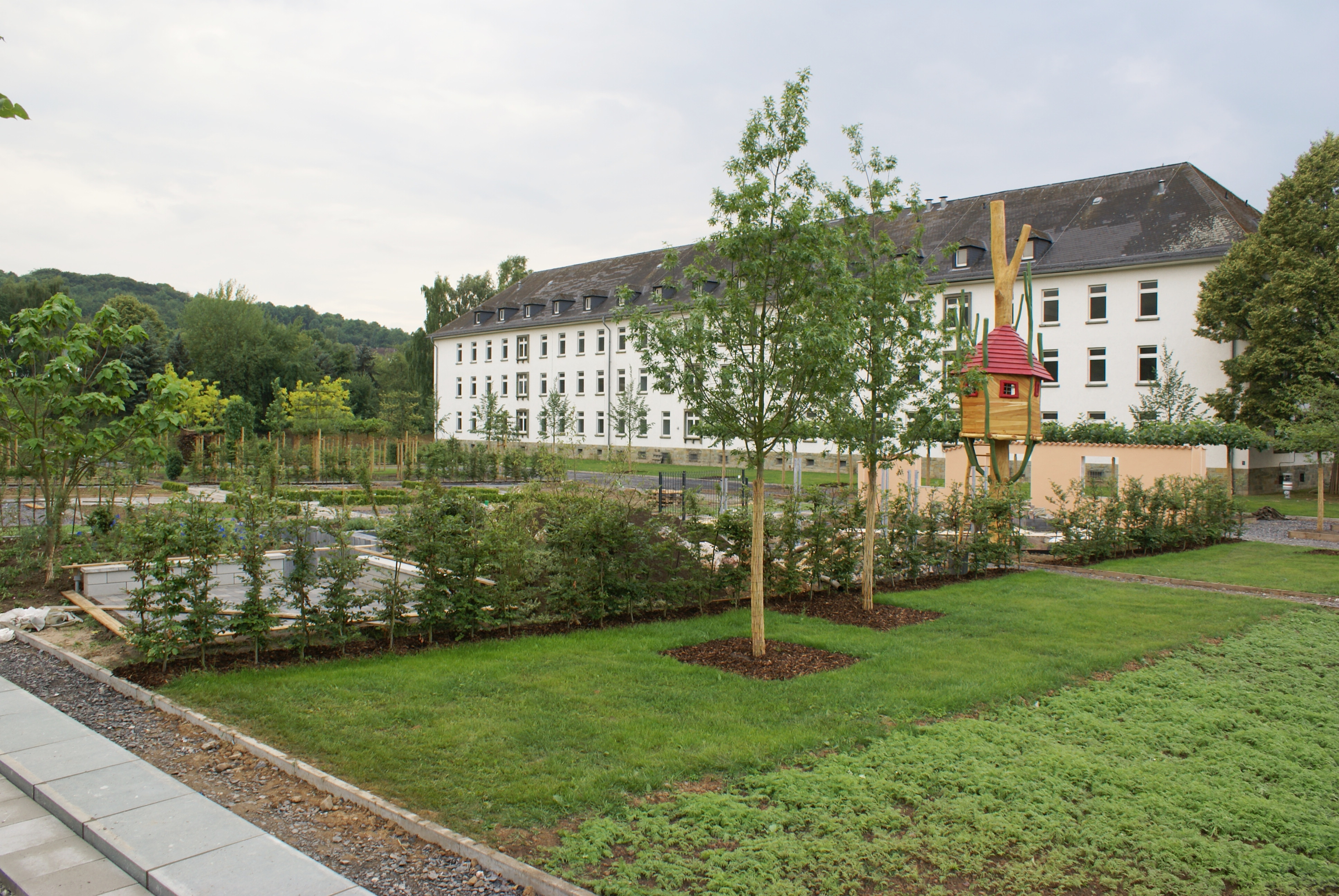 In Bau befindliche Themengärten der Landesgartenschau Hemer